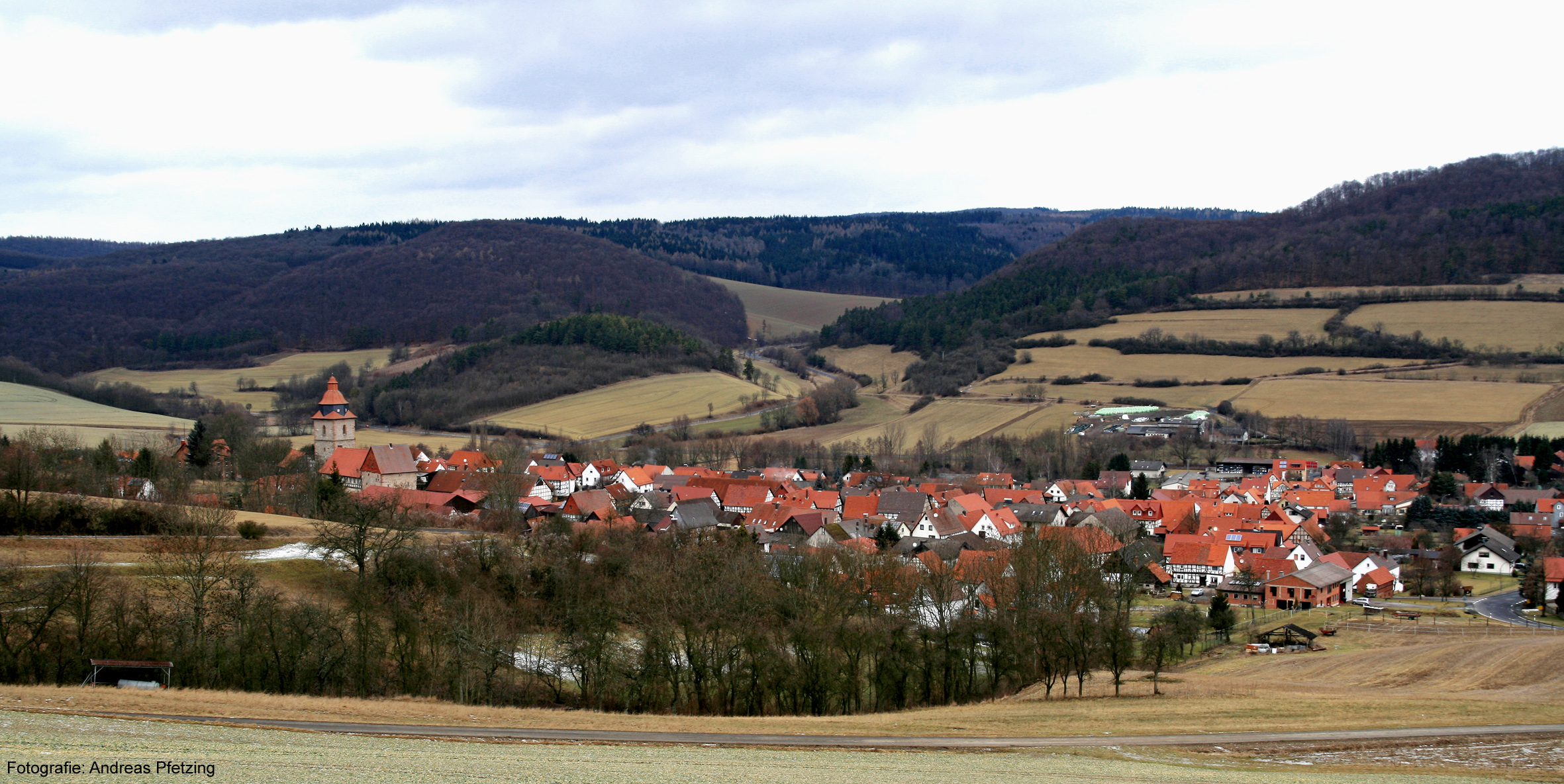 Blick auf das winterliche Röhrda, aufgenommen von der Landstraße Richtung Grandenborn, Fotografie: Andreas Pfetzing (ein Auszug (Wohnturm+Kirche) ist hier: File:Rhörda-Burg-wohnturm.PNG)